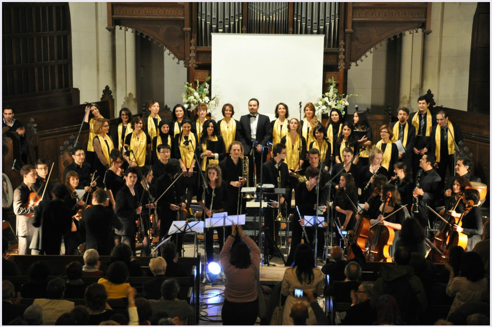 Orchestre Philharmonique de Paris-Est et la chorale de Bahar Concert la voix de la PAIX, à l'église Américaine de Paris, Le 26 Avril 2013